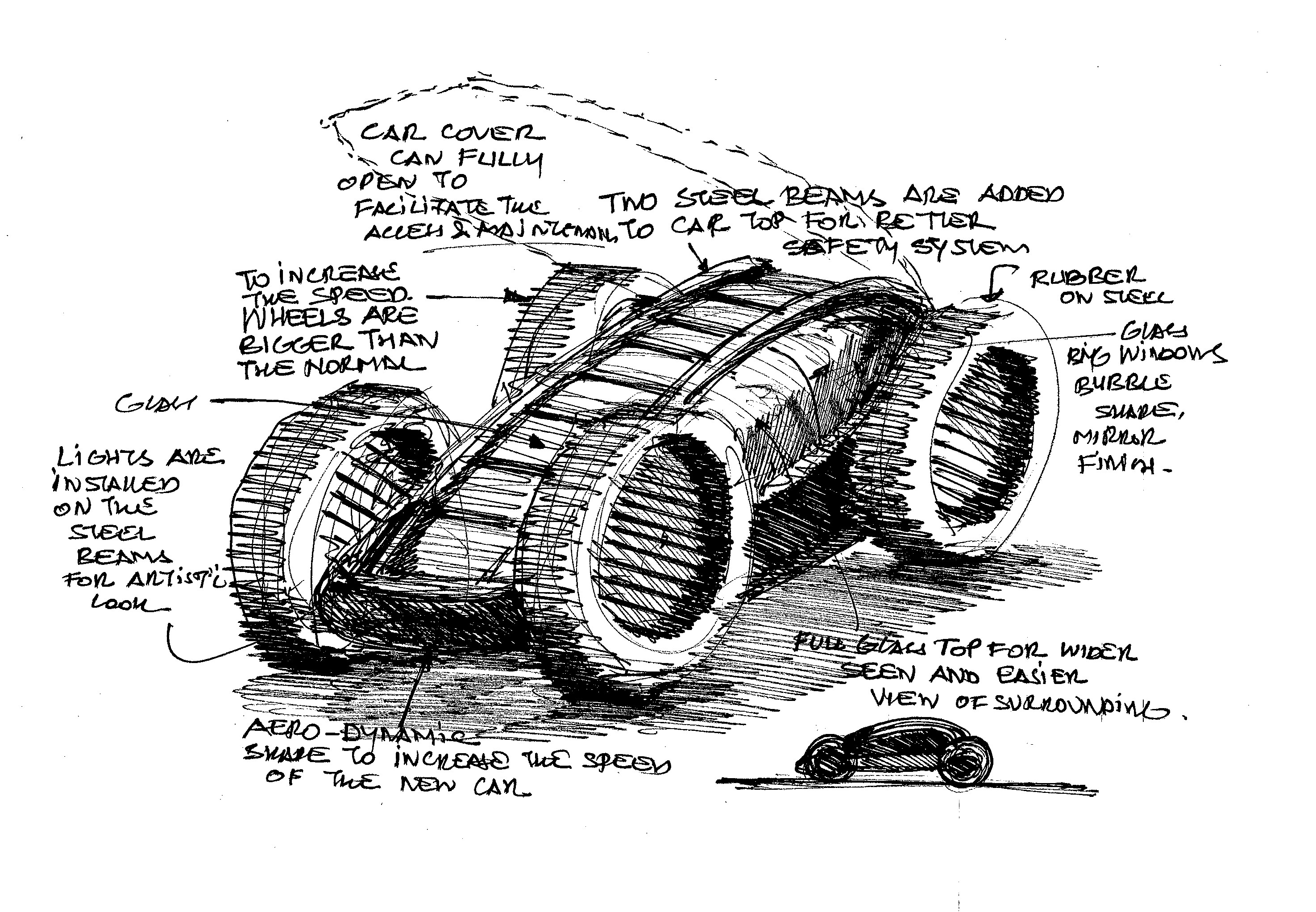 Conceptual Car Design